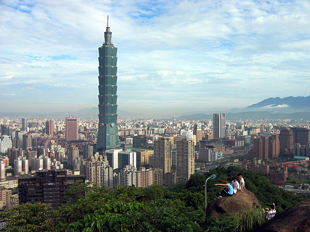 象山六巨石風景